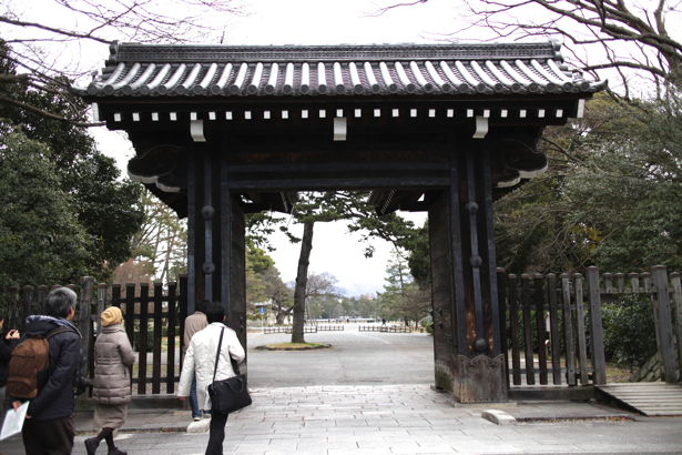 京都御苑 蛤御門 堀川通り側 １